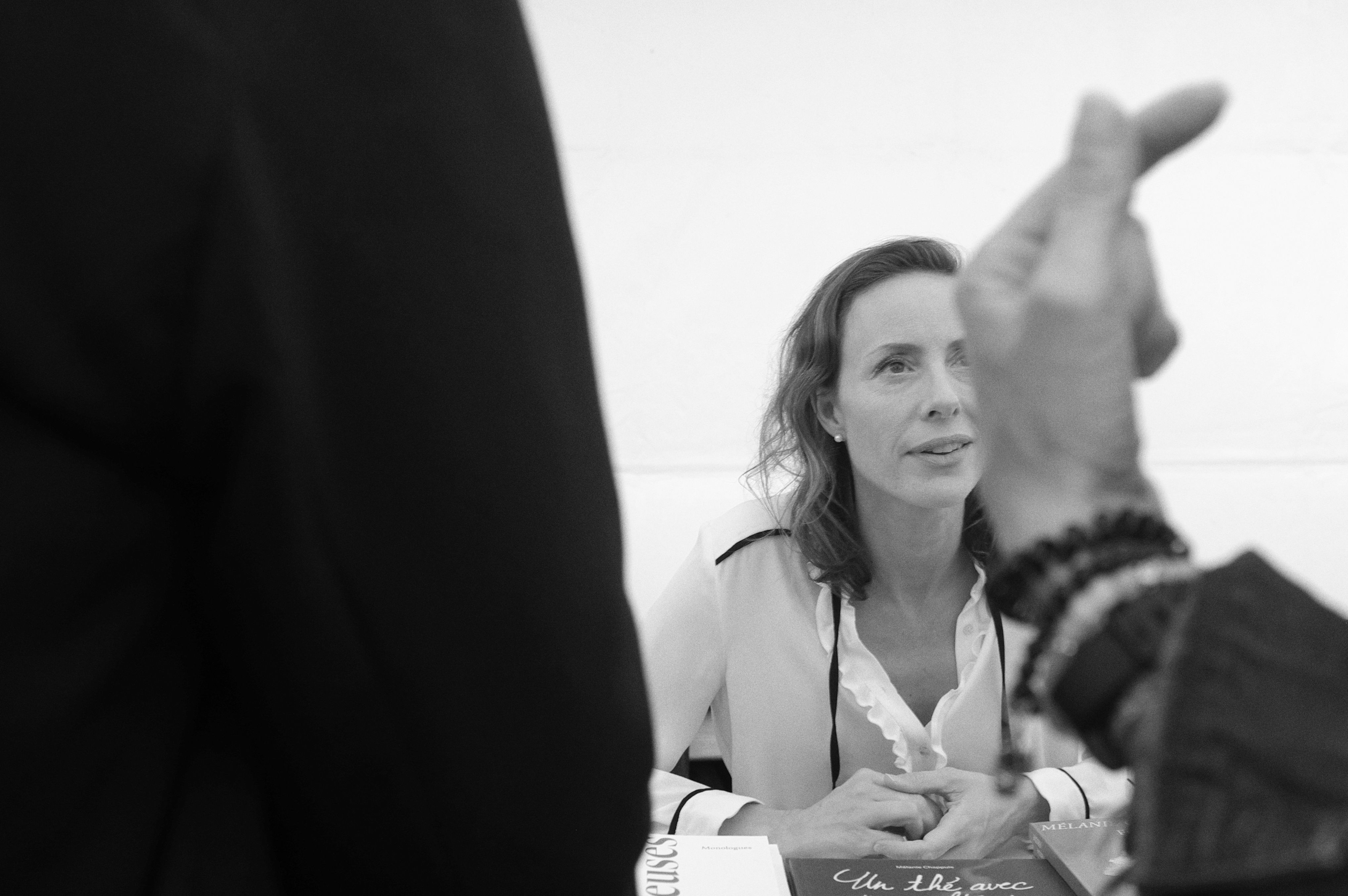 Séance de dédicaces - Le livre sur les quais, Morges, Suisse